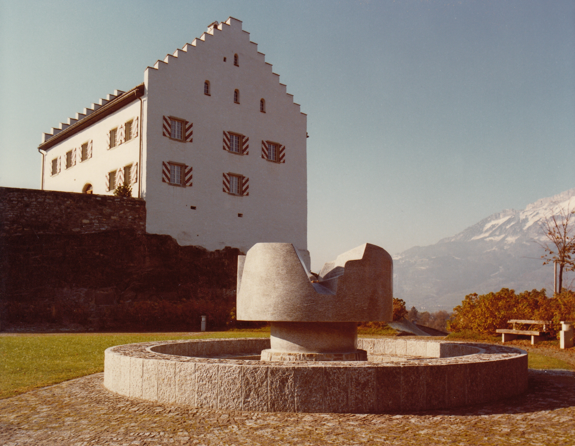 Brunnen, 1978-80, Bendern, Granit Cresciano gesch., 165 x 250 cm